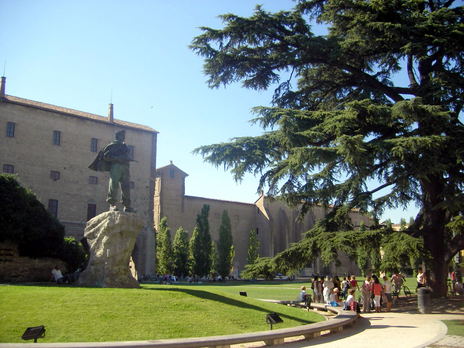 Parma - Piazza delle Pace con il Monumento al Partigiano. Sullo sfondo, il Palazzo della Pilotta.